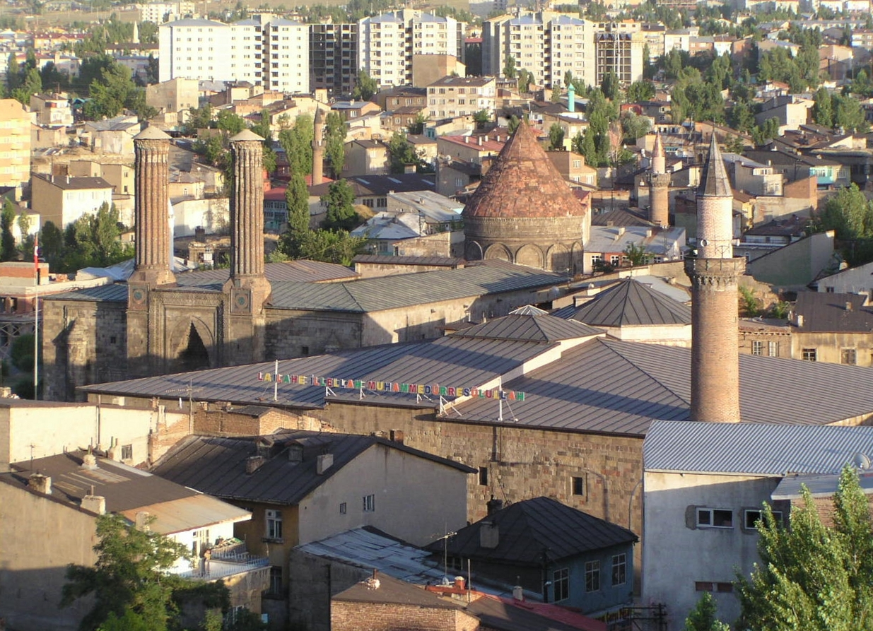 Blick auf Erzurum (Türkei)